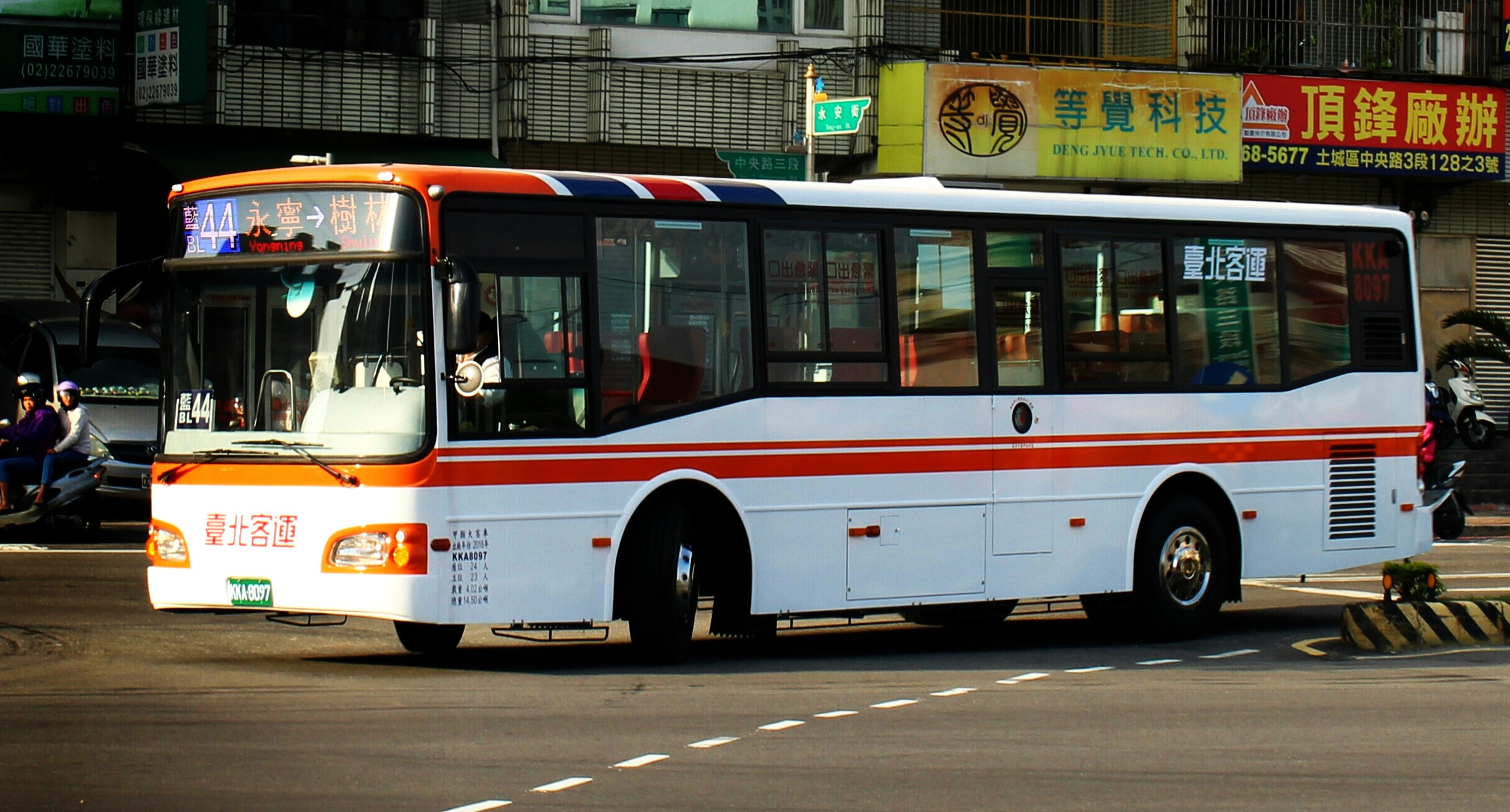 2018 HINO RK8JMVA-KJF KKA-8097 藍44